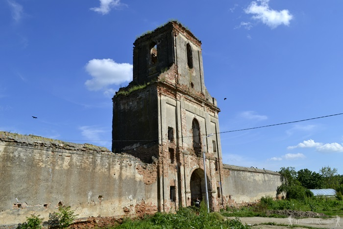 Turn clopotniță 03